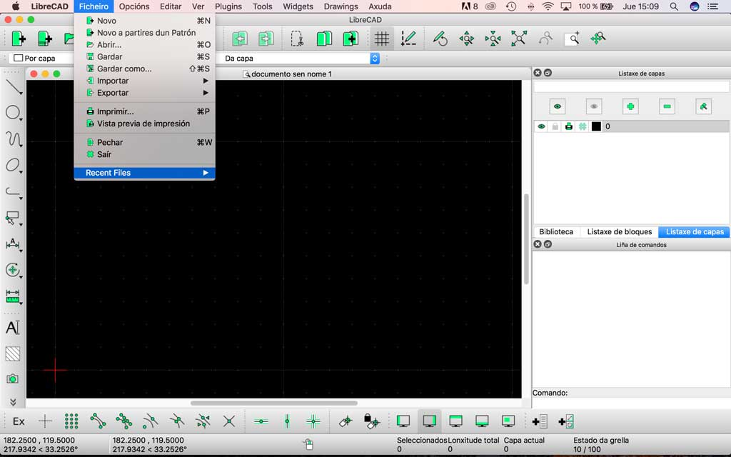 Pantalla inicial de LibreCAD 2.1.3 en galego.